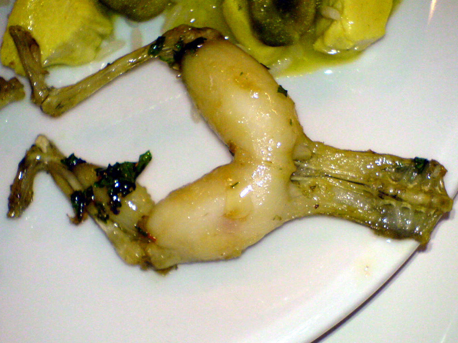 Frølår